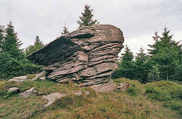 Severní Marušin kámen.